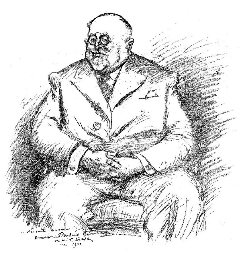 Portrait du chansonnier goguettier Dominique Bonnaud par Charles Léandre.